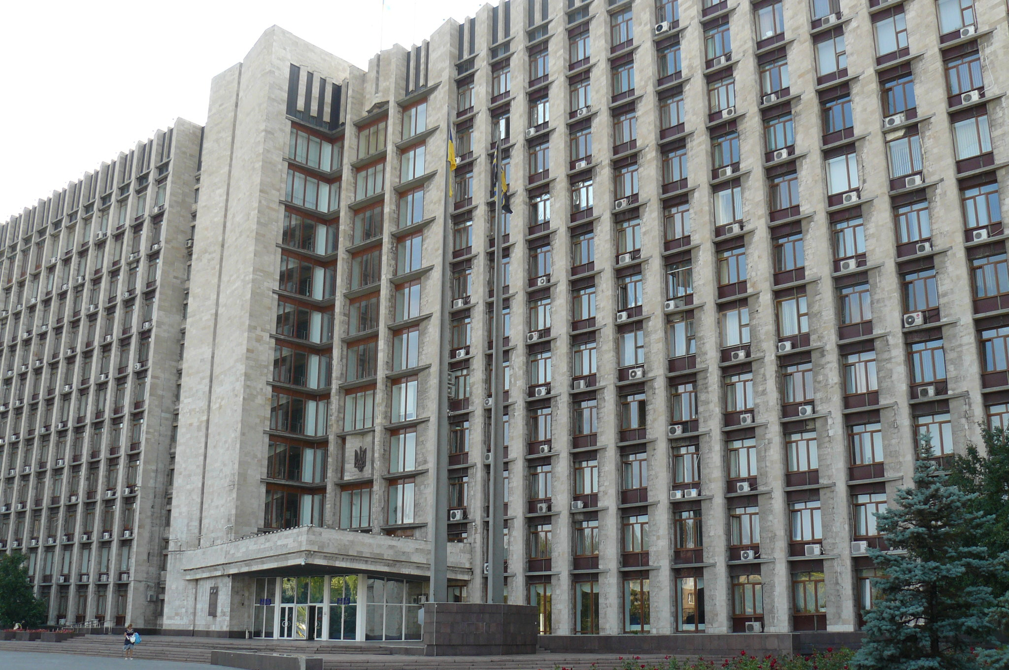 Donetsk, Regional State Administration building.